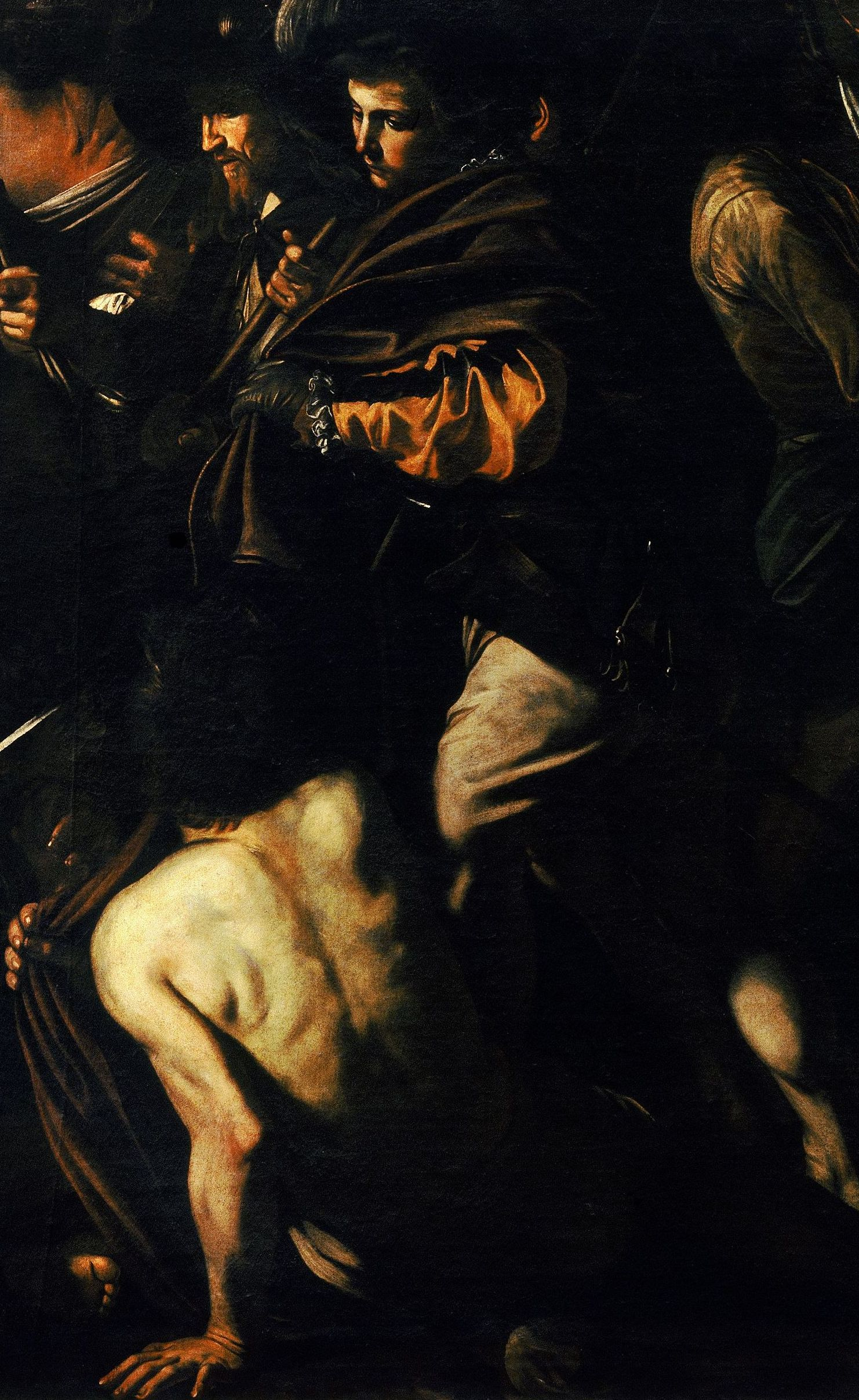 Caravaggio - Sette opere di Misericordia (1607, Pio Monte della Misericordia - Naples) Vestire gli ignudi'